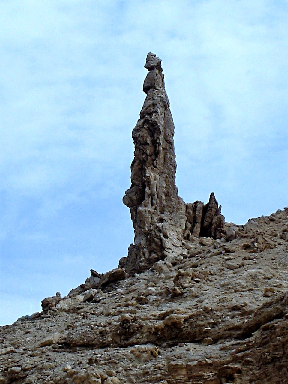 Statue d' Ildith, femme de Loth. Mer morte, Jordanie